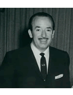 fotografia luis arcaraz